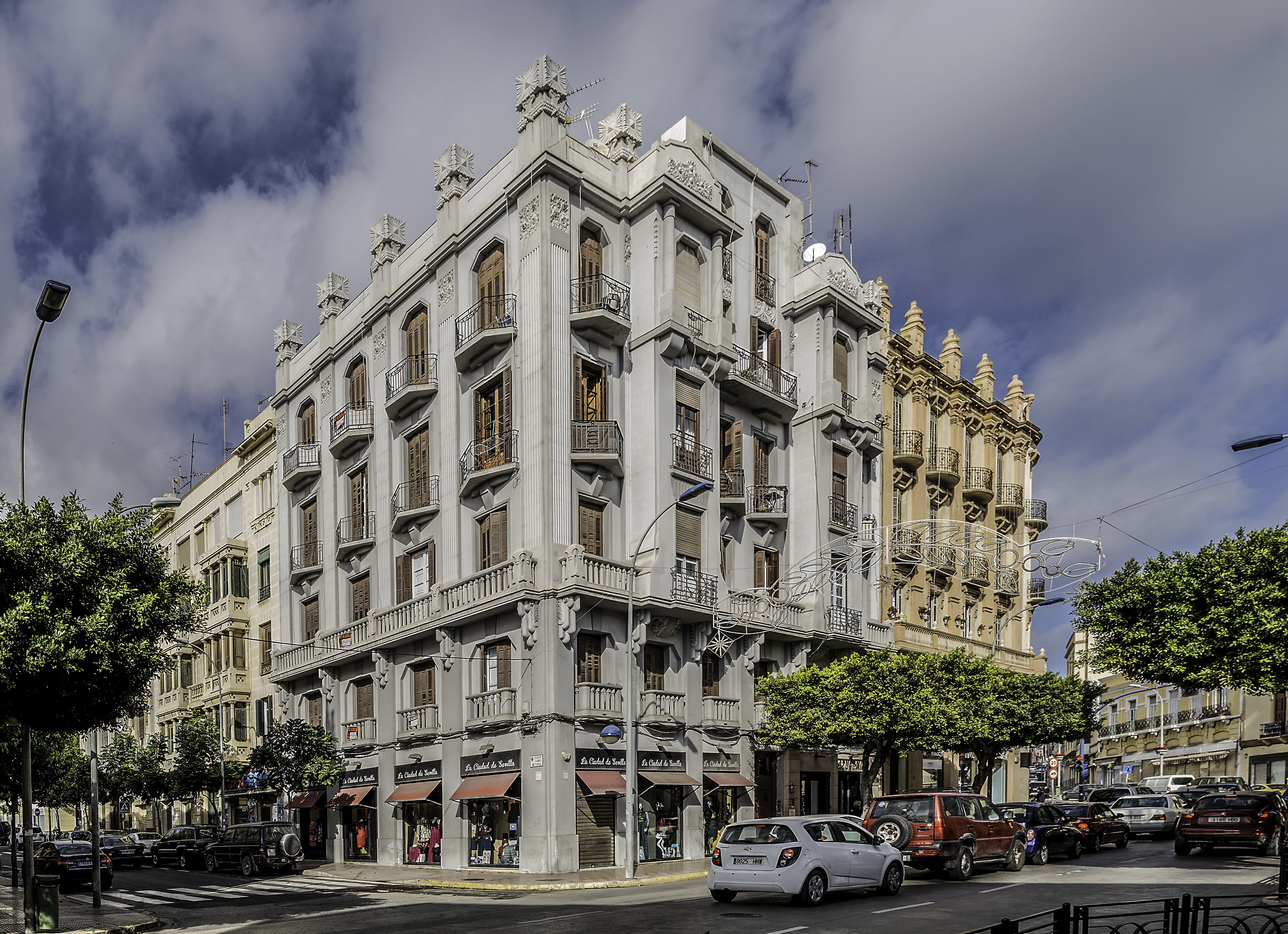 La Casa de Enrique Nieto es un inmueble de estilo art decó situado en la esquina que forman la Avenida de los Reyes Católicos, 4 y la calle Lope de Vega en la ciudad española de Melilla y forma parte del Conjunto Histórico Artístico de la Ciudad de Melilla, un Bien de Interés Cultural.